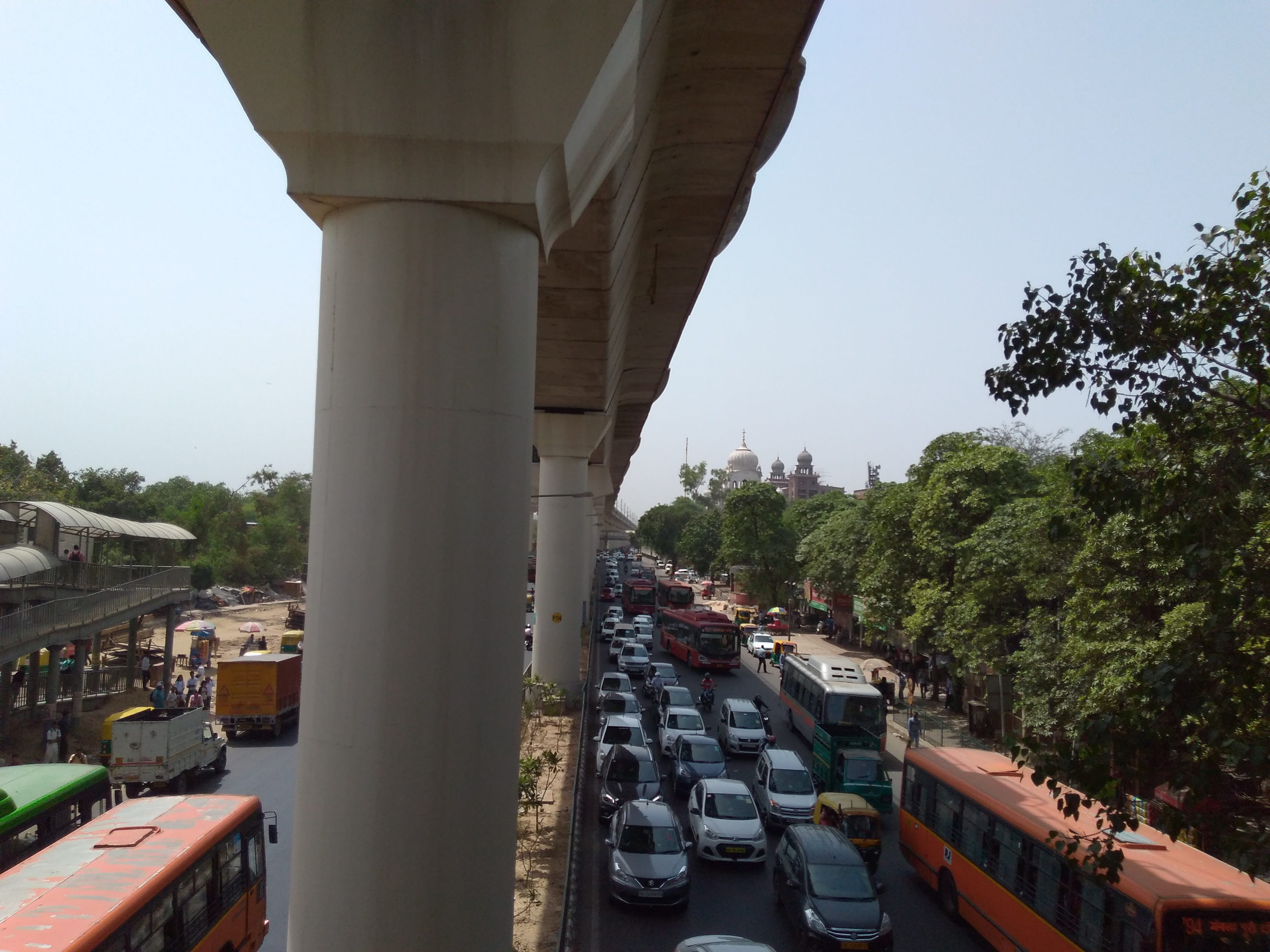 Ring road at Satya niketan delhi